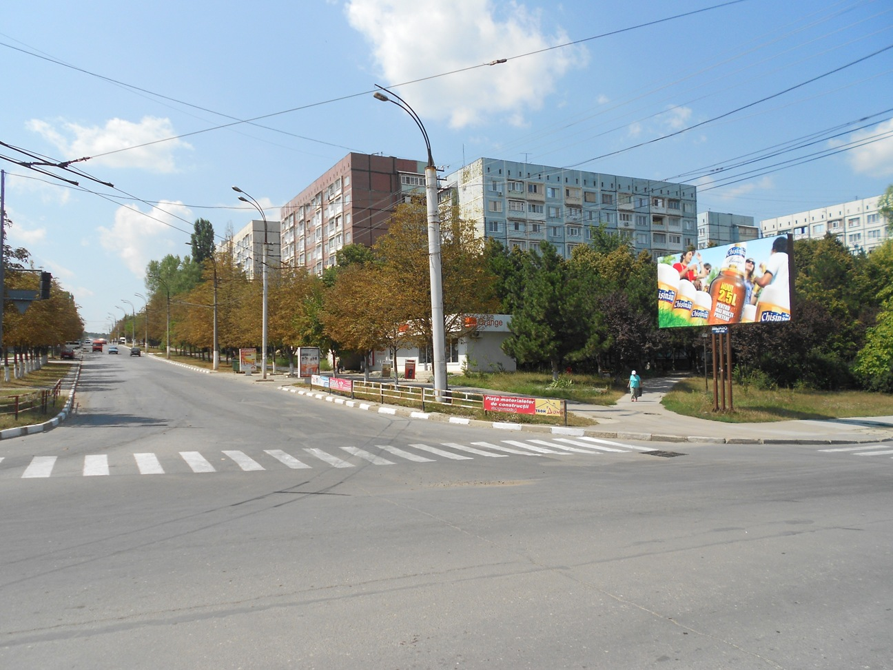 Intersecţia străzilor Bulgară şi Alexandru cel Bun, cartierul Dacia, Bălți